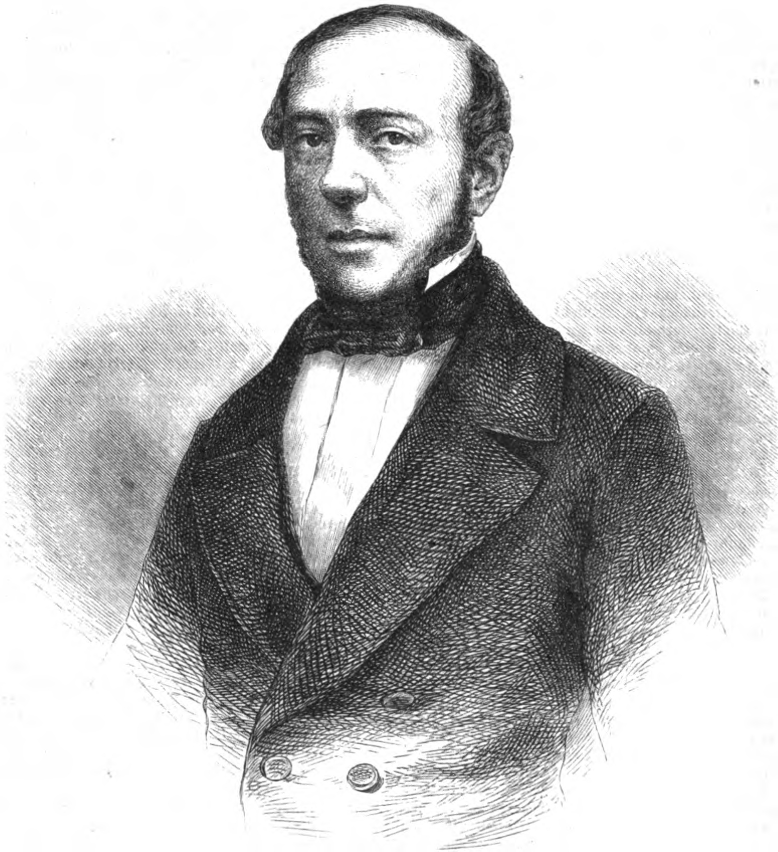 Michael Baumgarten, deutscher protestantischer Theologe im 19. Jh.